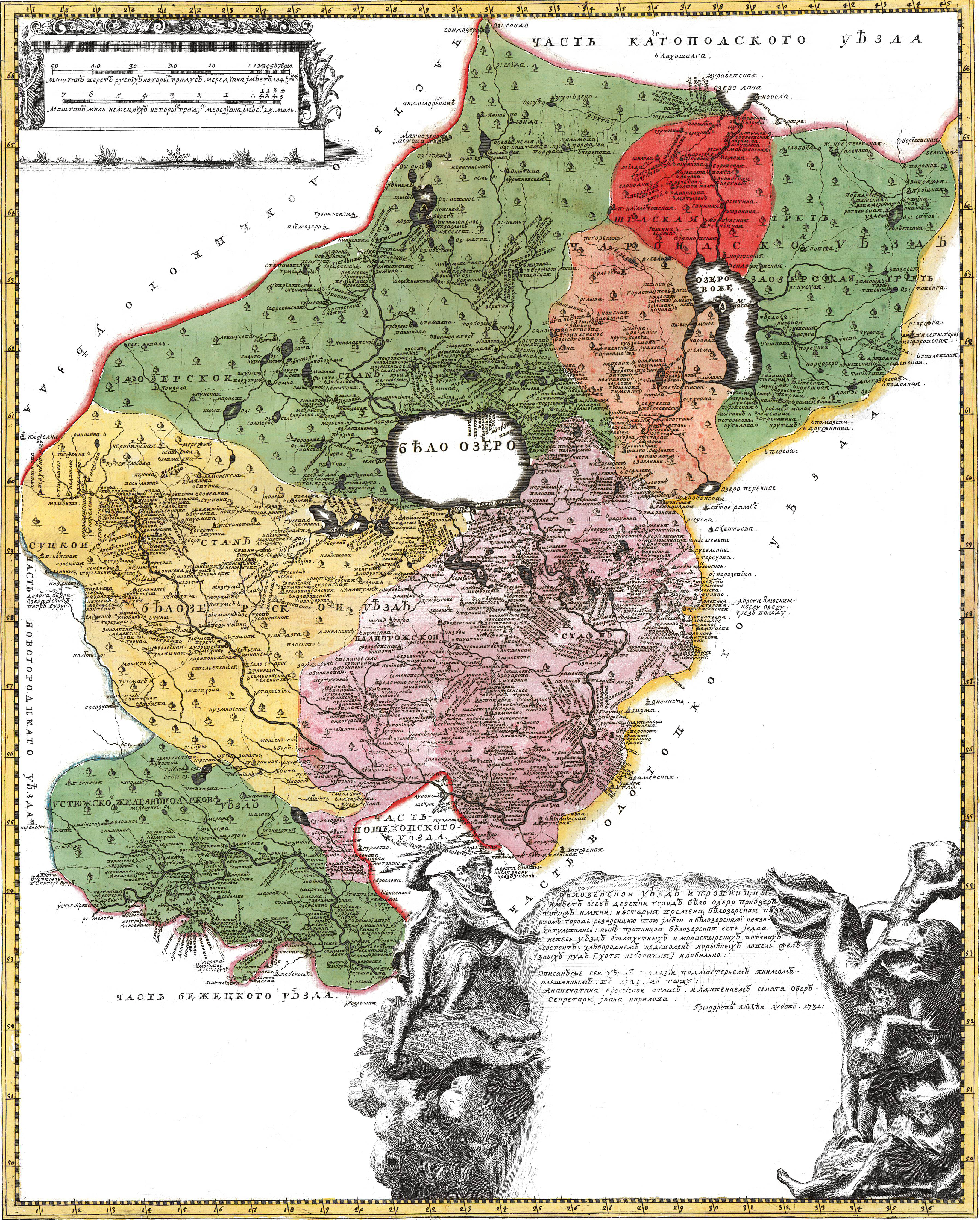 Белозерский уезд и провинция из «Атласа Всероссийской империи» И. К. Кириллова. 1722-1737 гг.